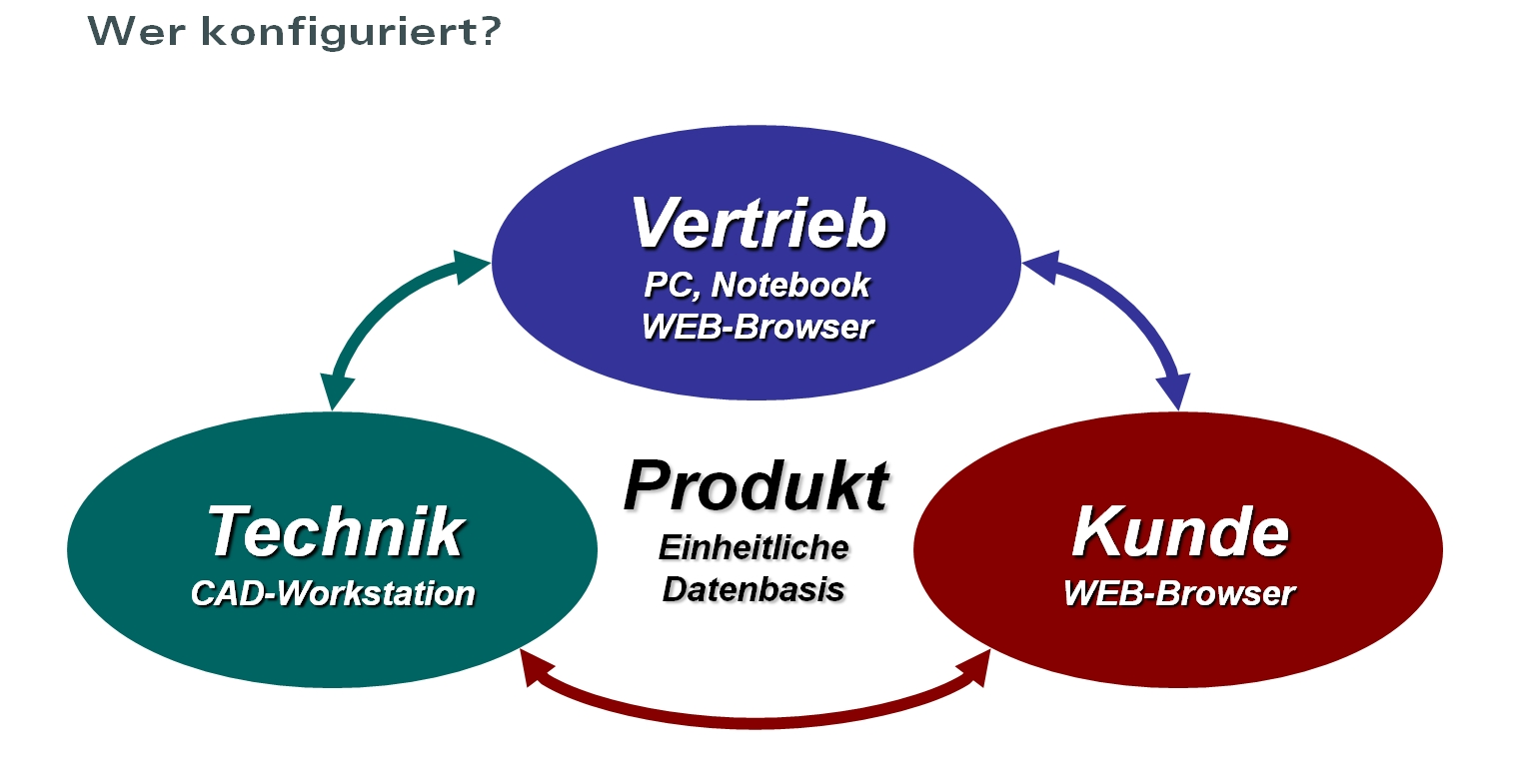 Wer sind die Anwender bei der CAD-zentrischen Produktkonfiguration.